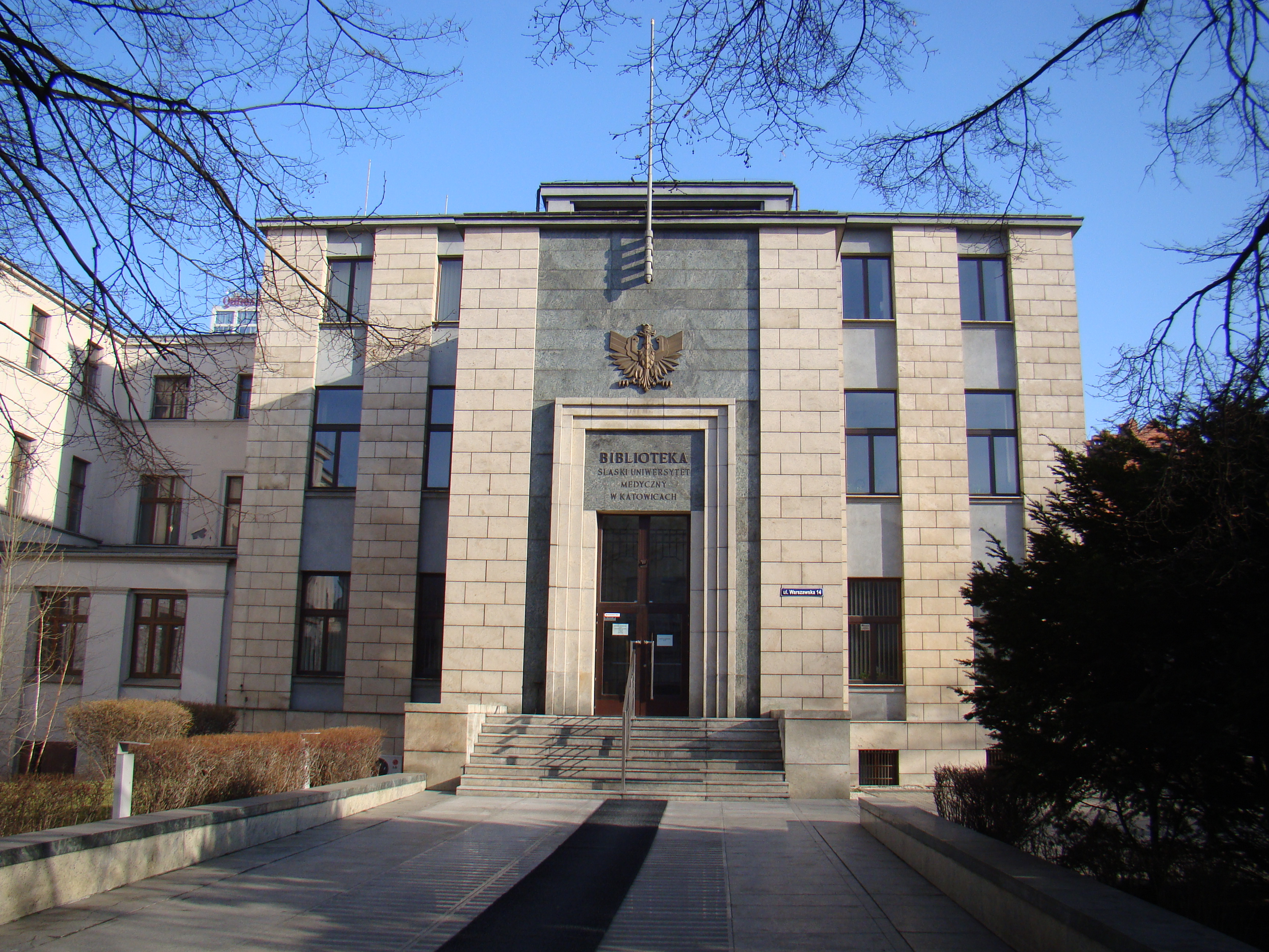 Katowice, dom, ob. bank (dec. Bank Śląski), 1906, 1938